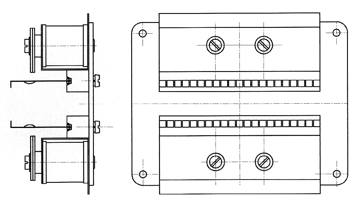 Rezgőnyelves mérőmű